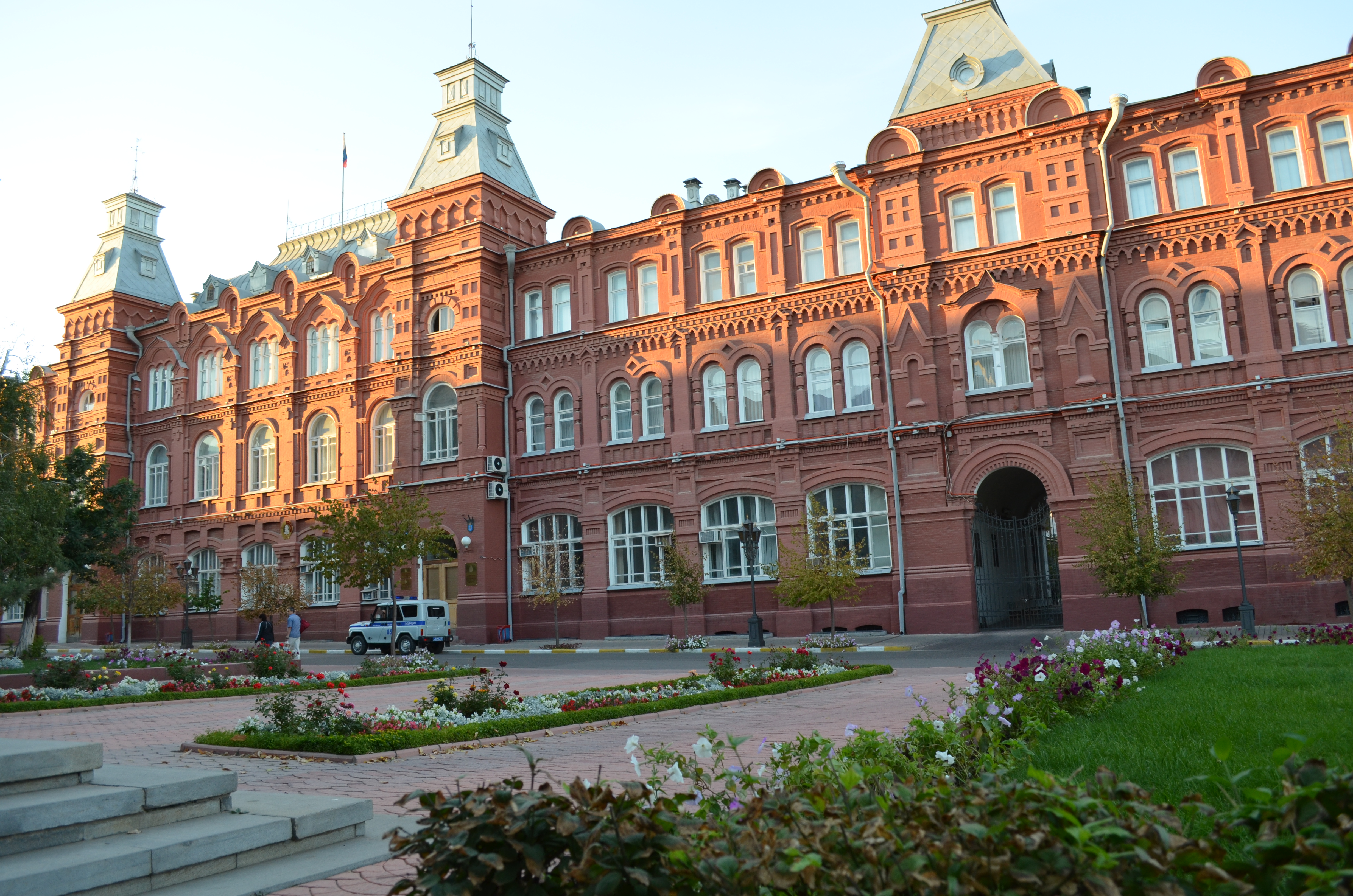 Здание городских учреждений (Городской Думы), 1911 г. постройки, архитекторы: В.А. Шретер, К.К. Домантович, П.И. Коржинский